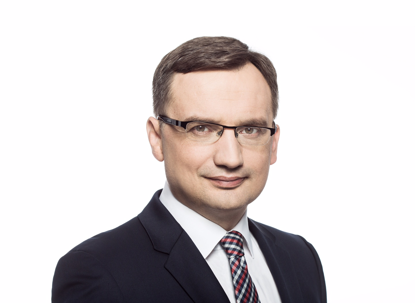 Zbigniew Ziobro. Minister sprawiedliwości.